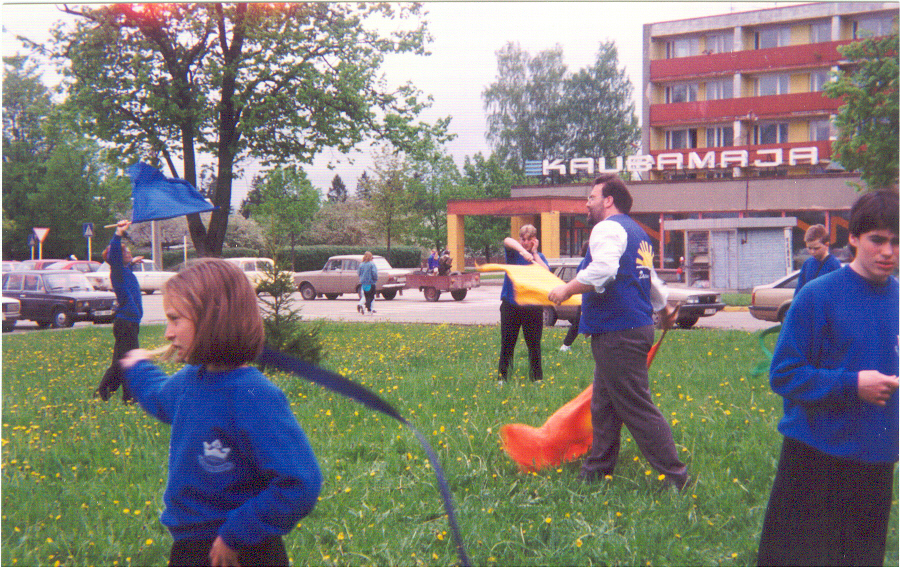 Engelske pinsevenner driver med evangelisering foran butikkene i Karksi-Nuia. Foto: Jan-Erik Løken